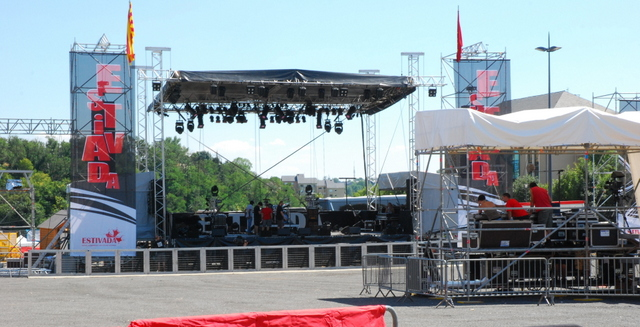 Empont Grand